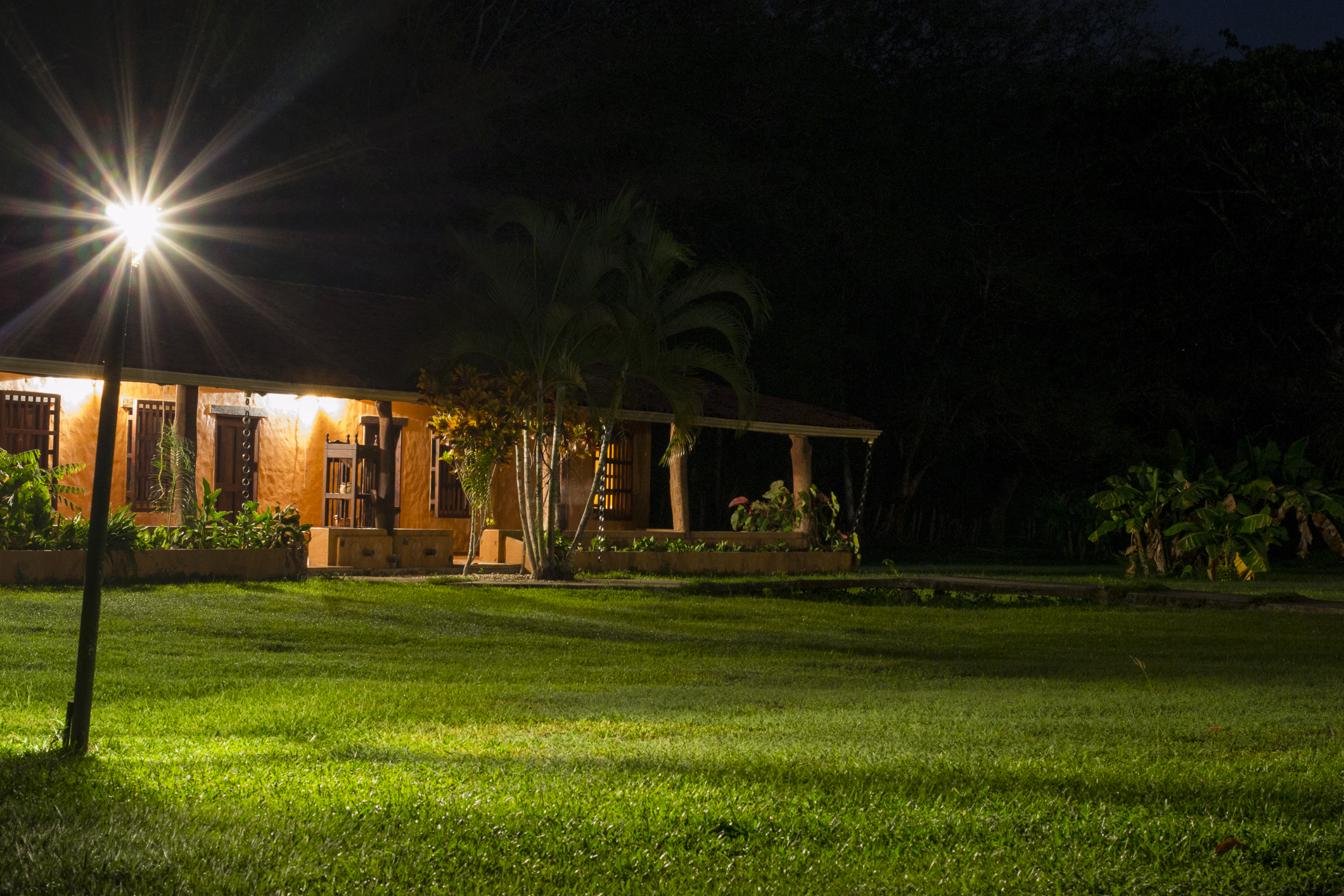 Barinas, Venezuela